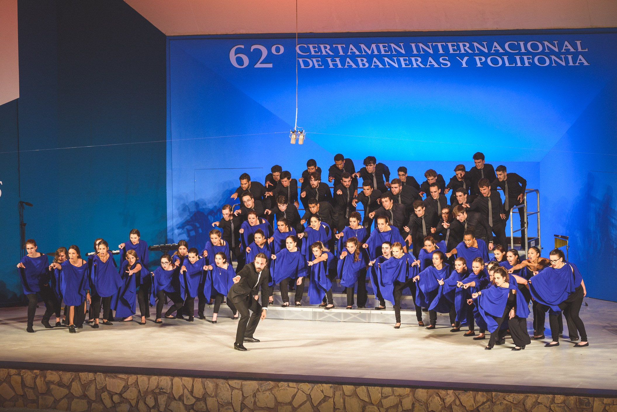 El Coro de Jóvenes de Madrid durante su actuacón en el 38º Certámen Internacional de Habaneras y Polifonía de Torrevieja